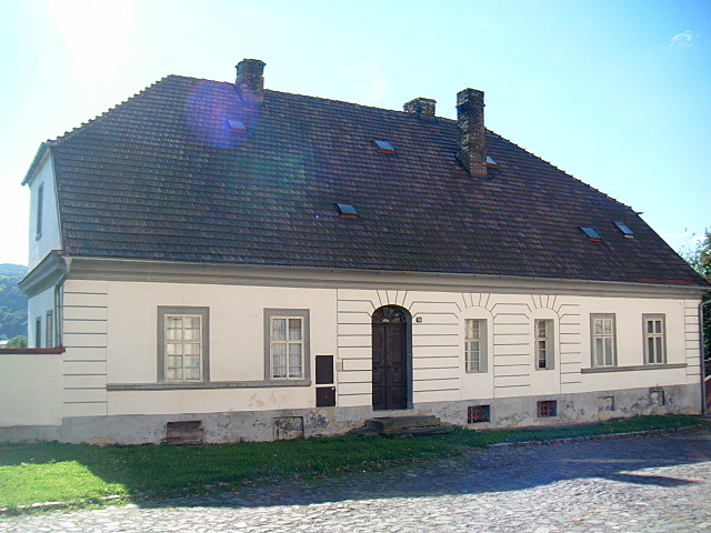 Fara (Benešov nad Ploučnicí), Benešov nad Ploučnicí 70